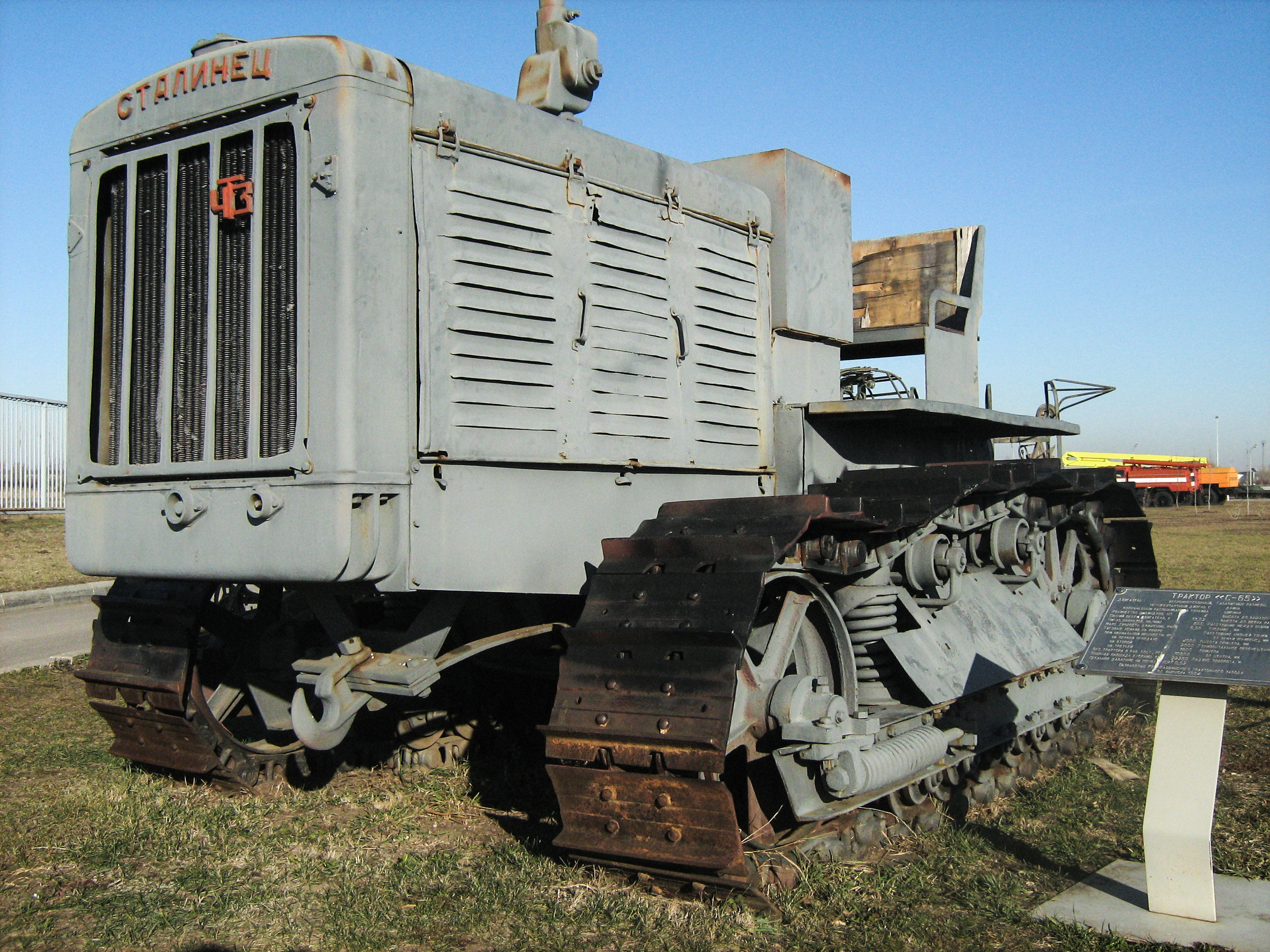 Трактор "С-65" в музее техники ВАЗа